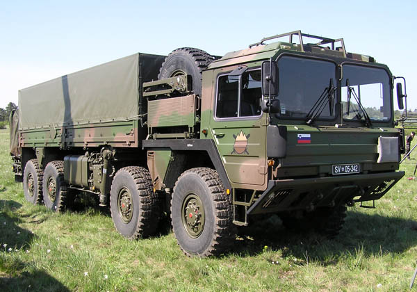 Slovenian MAN Army Truck